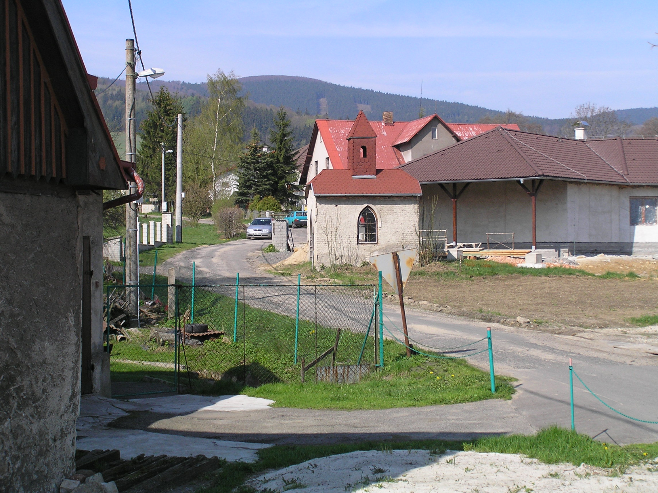 minkovická kaplička uprostřed novostaveb rodinných domků